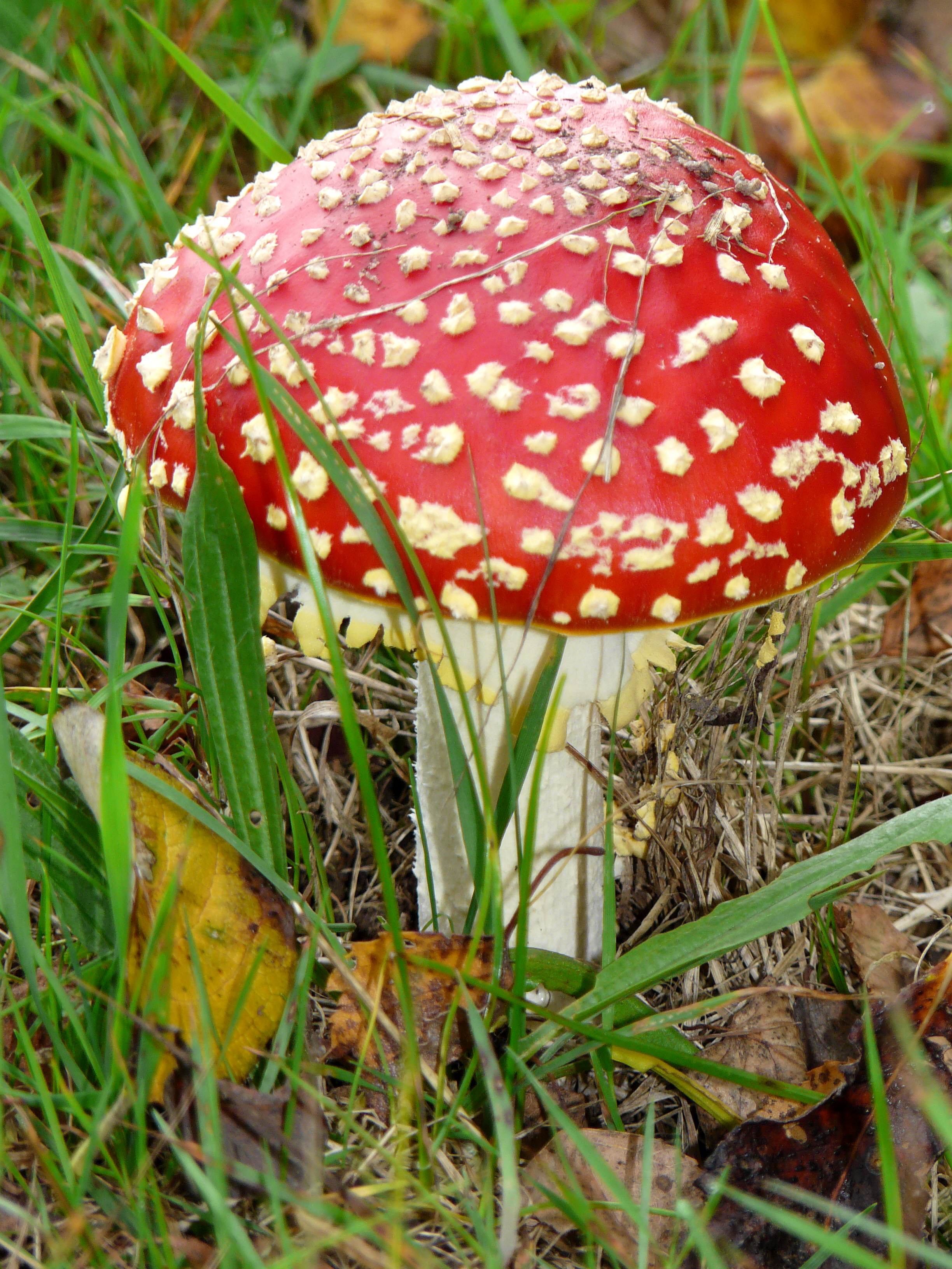 Fliegenpilz am Limeswanderweg zwischen den Turmstellen Wp 10/14 und Wp 10/15 am Odenwaldlimes